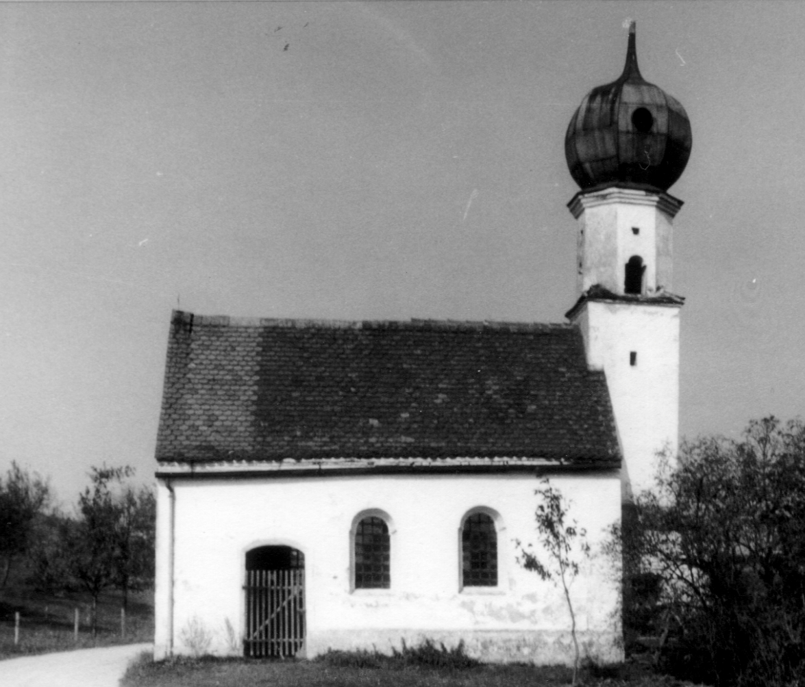 Ansicht von Süden